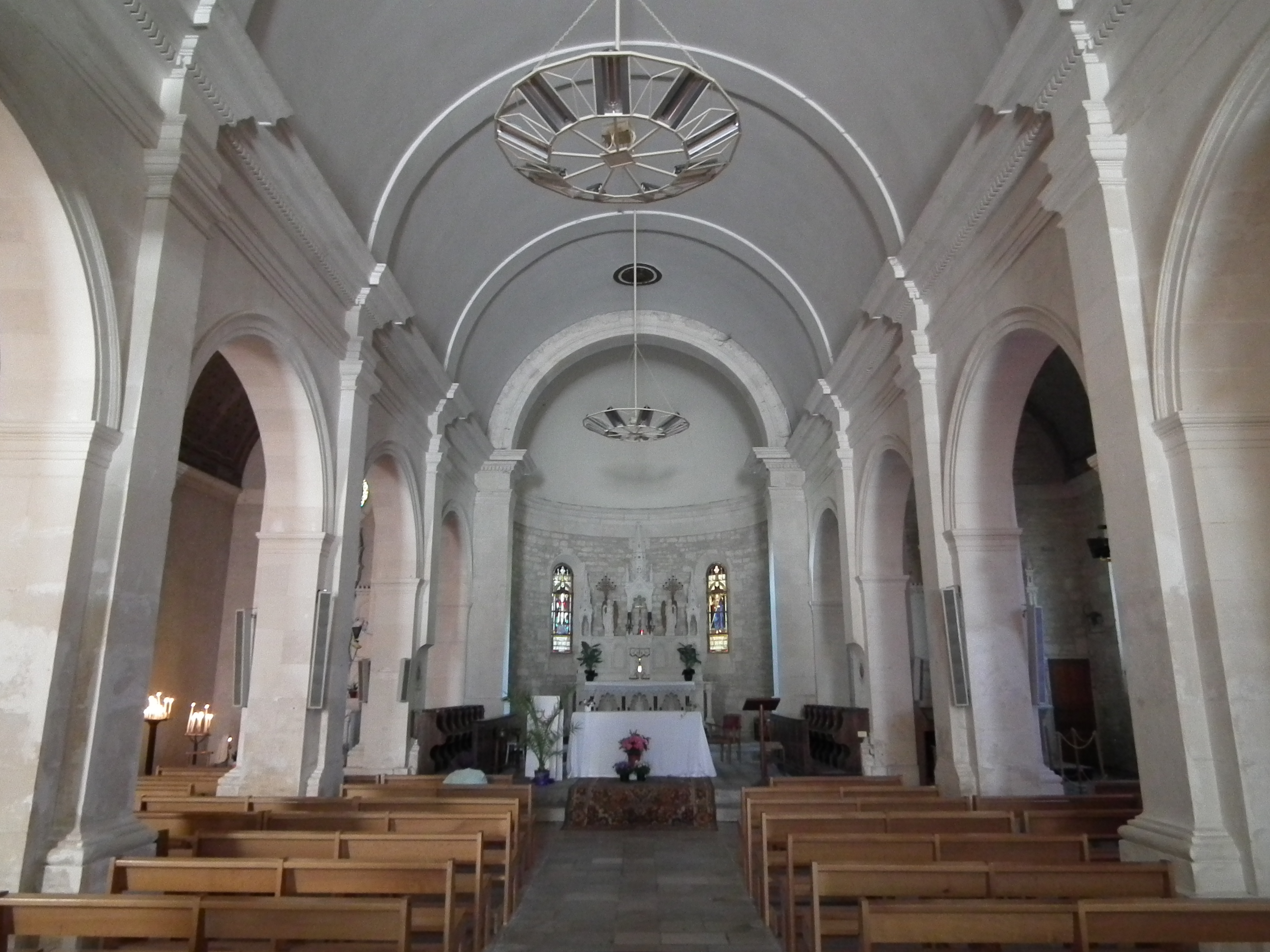 Intérieur de l'église de Saint-Denis-d'Oléron